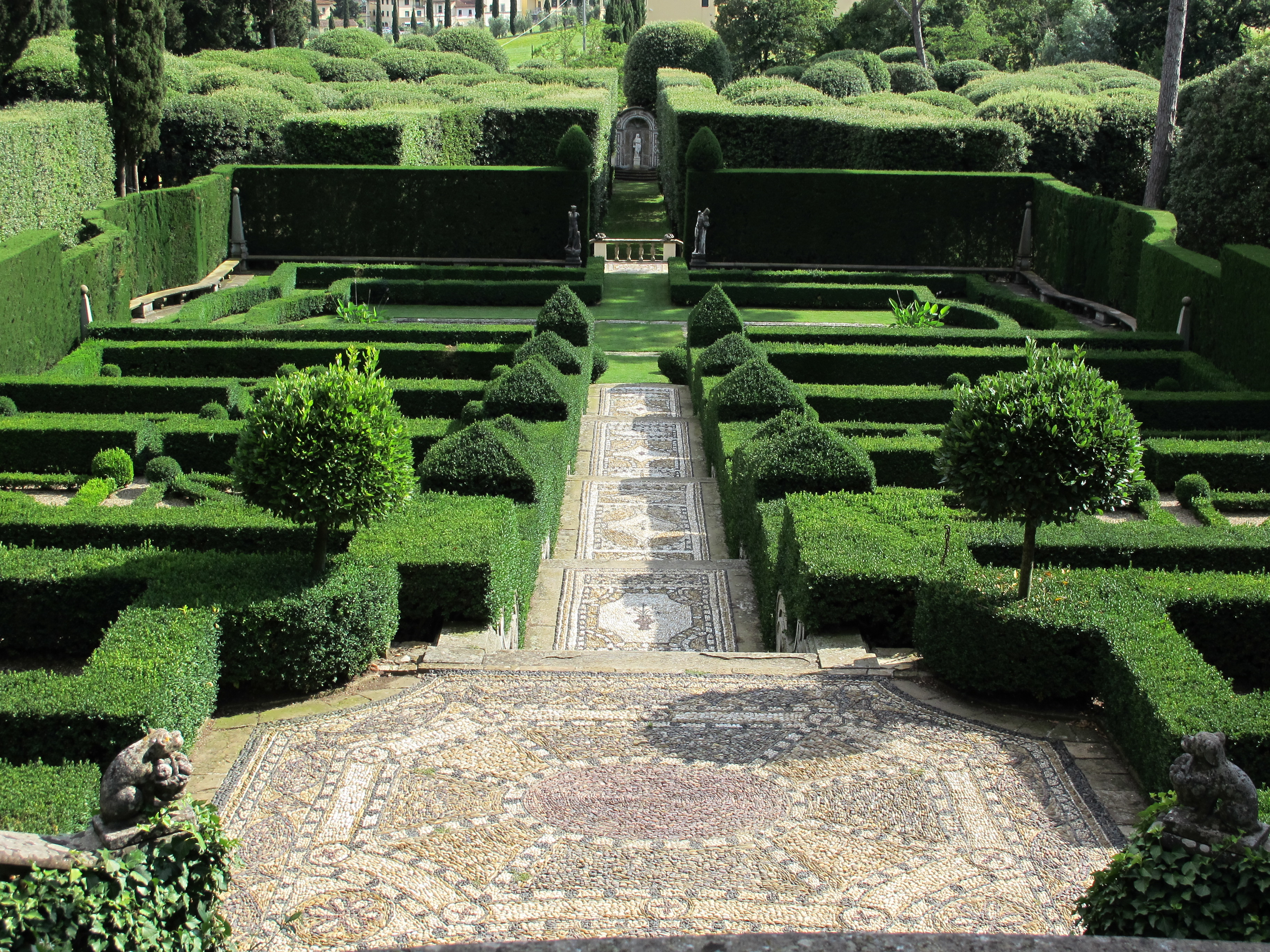 Villa i tatti, ext., giardino